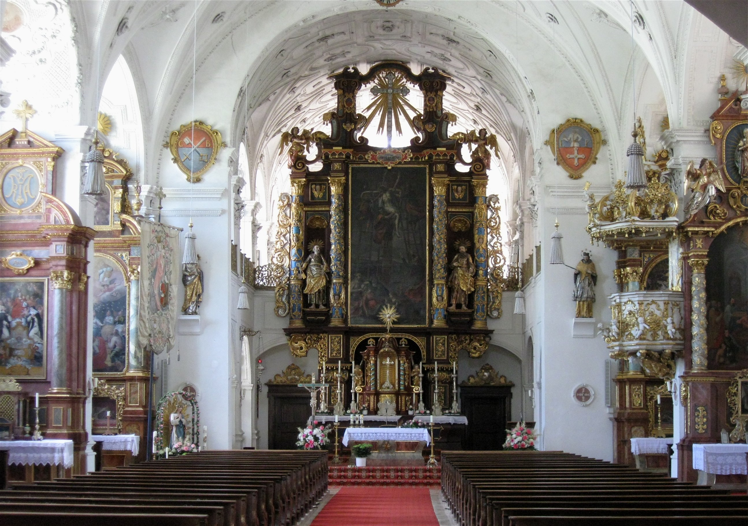 Beuerberg Königsdorfer Straße 1; Ehem. Augustinerchorherren-Stift; ehem. Stiftskirche St. Peter und Paul, jetzt kath. Pfarrkirche, barocker Wandpfeilersaal mit Abseiten, eingezogenem Chor und nordwestlichem Zwiebelturm, Neubau nach Einsturz 1629-35, 1729/30 verlängert; mit Ausstattung; Stiftsgebäude, barocke Anlage um zwei Innenhöfe, 1729-45; mit Ausstattung; kath. Konventkirche Mariä Heimsuchung, Saalbau mit dreiseitigem Chorschluss und Empore, 1846; mit Ausstattung; Klostermauer, verputzte umlaufende Mauer, um 1745.